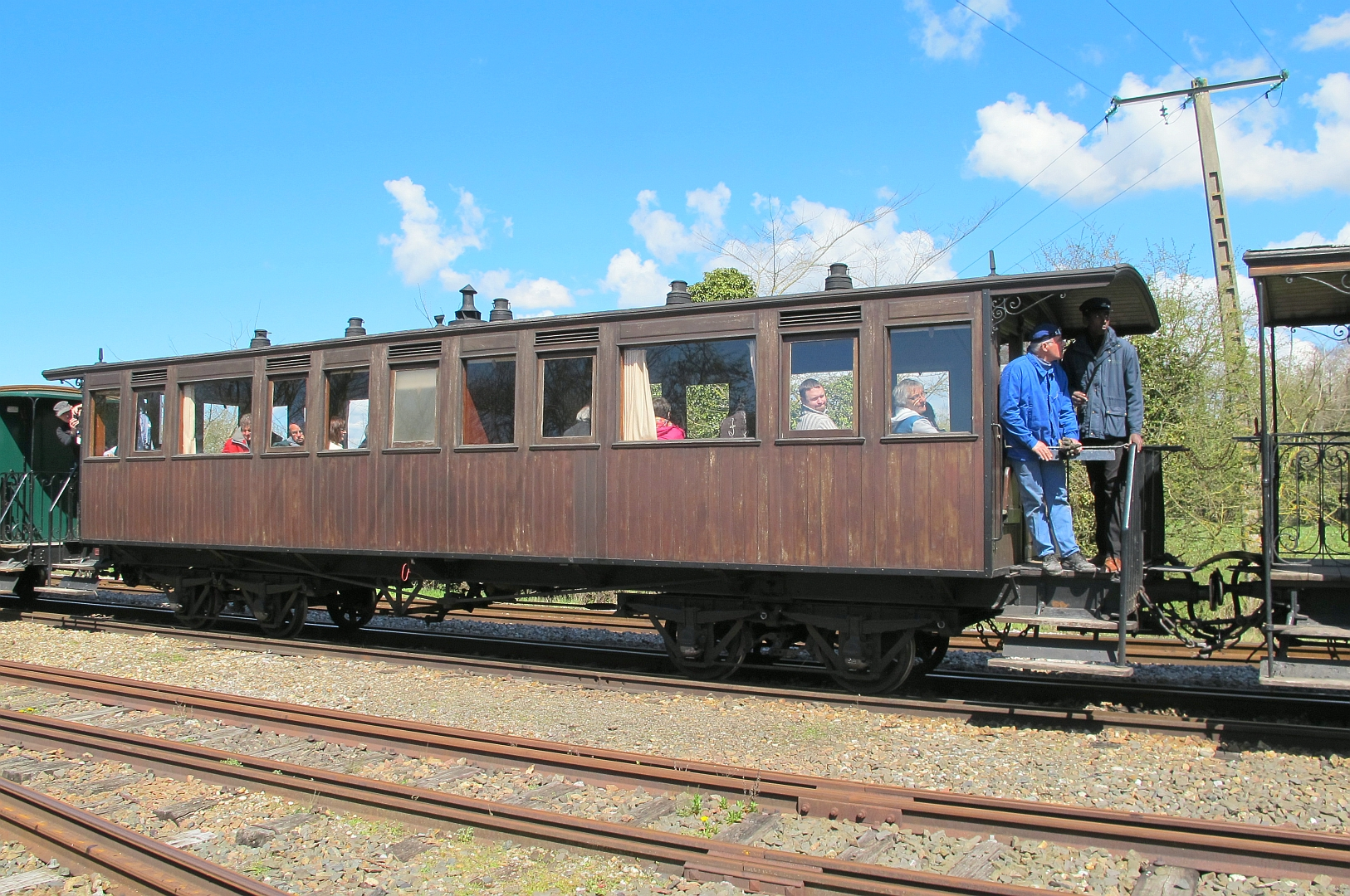 La voiture-salon du CFBS en gare de Noyelles sur le chemin de fer de la baie de Somme le 17 avril 2016